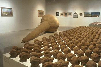 sculpture installation